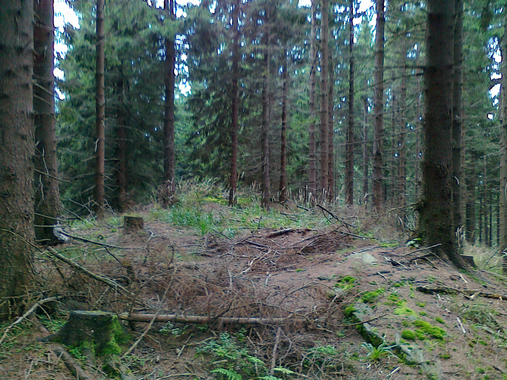 Widok na szczyt góry Nad Petrovkou - 1051 m n.p.m.